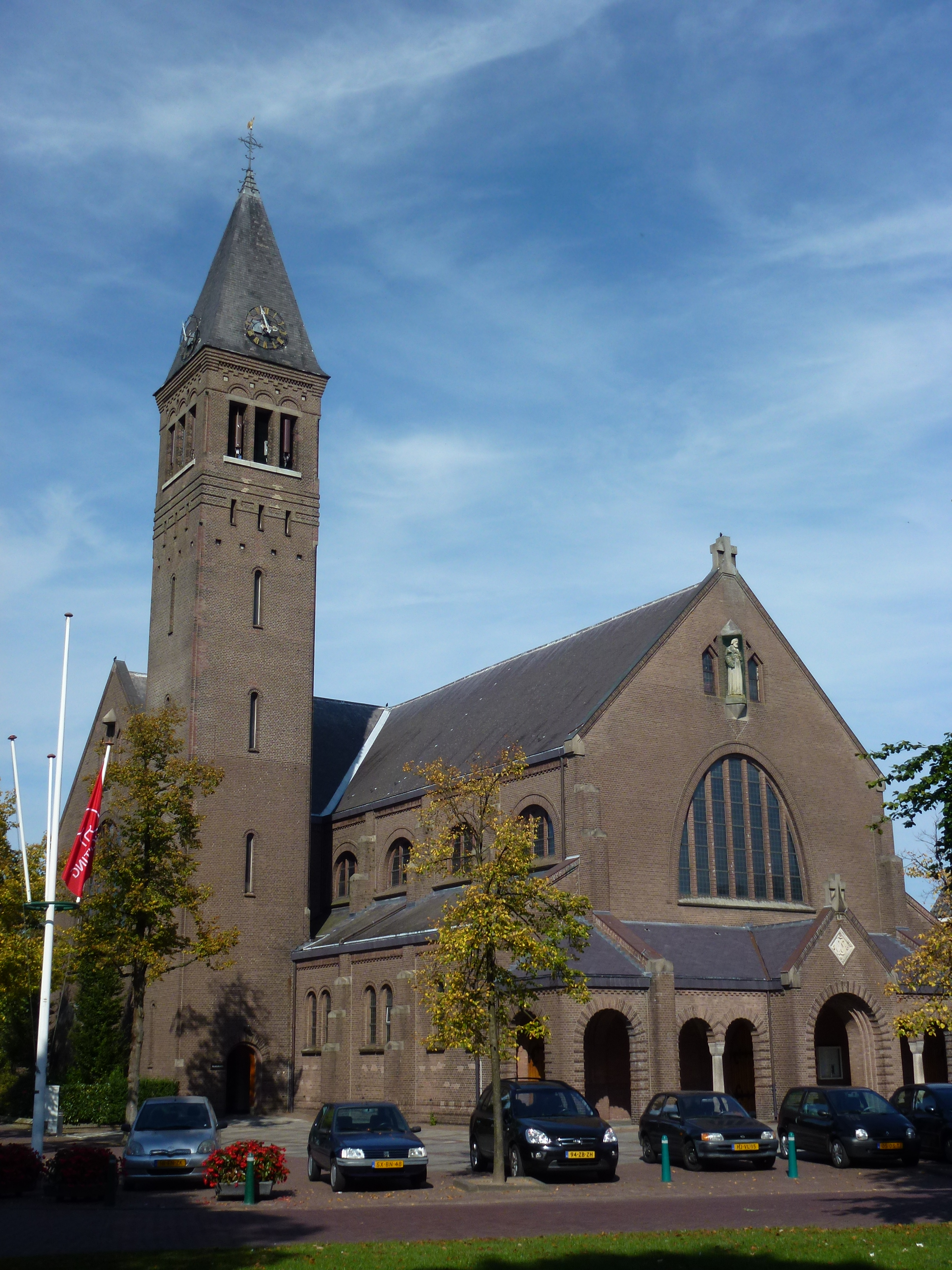 R.K. KERK St. Willibrordus uit 1925 met kenmerken van de neo-romaanse bouwstijl, ontworpen door architect L.J.P. Kooken uit Eindhoven.